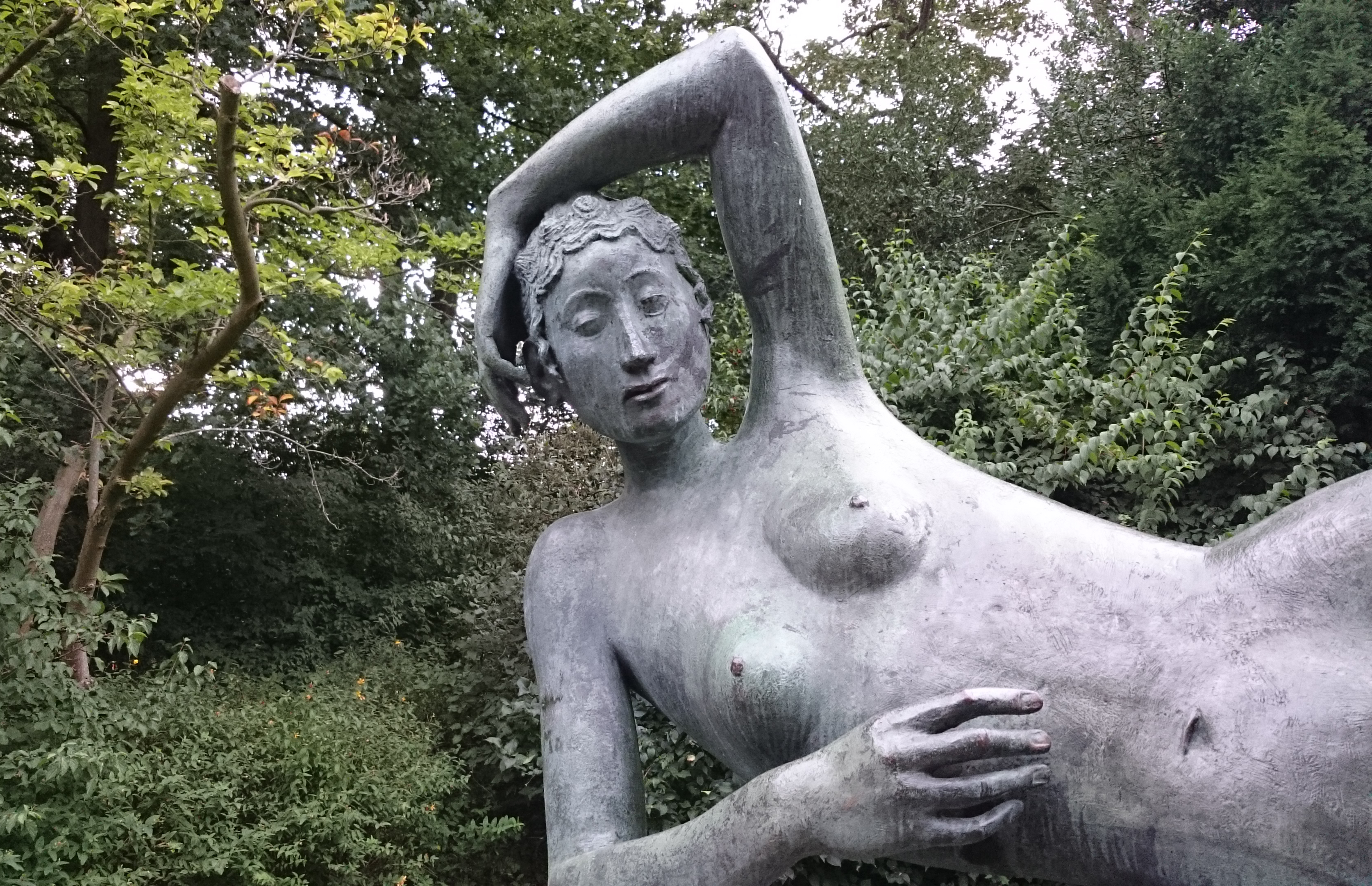 Liegende in Bremen,Das abgebildete Objekt ist ein geschütztes Kulturdenkmal in der Freien Hansestadt Bremen, mit der Nr. 1193,T009 beim Landesamt für Denkmalpflege registriert.